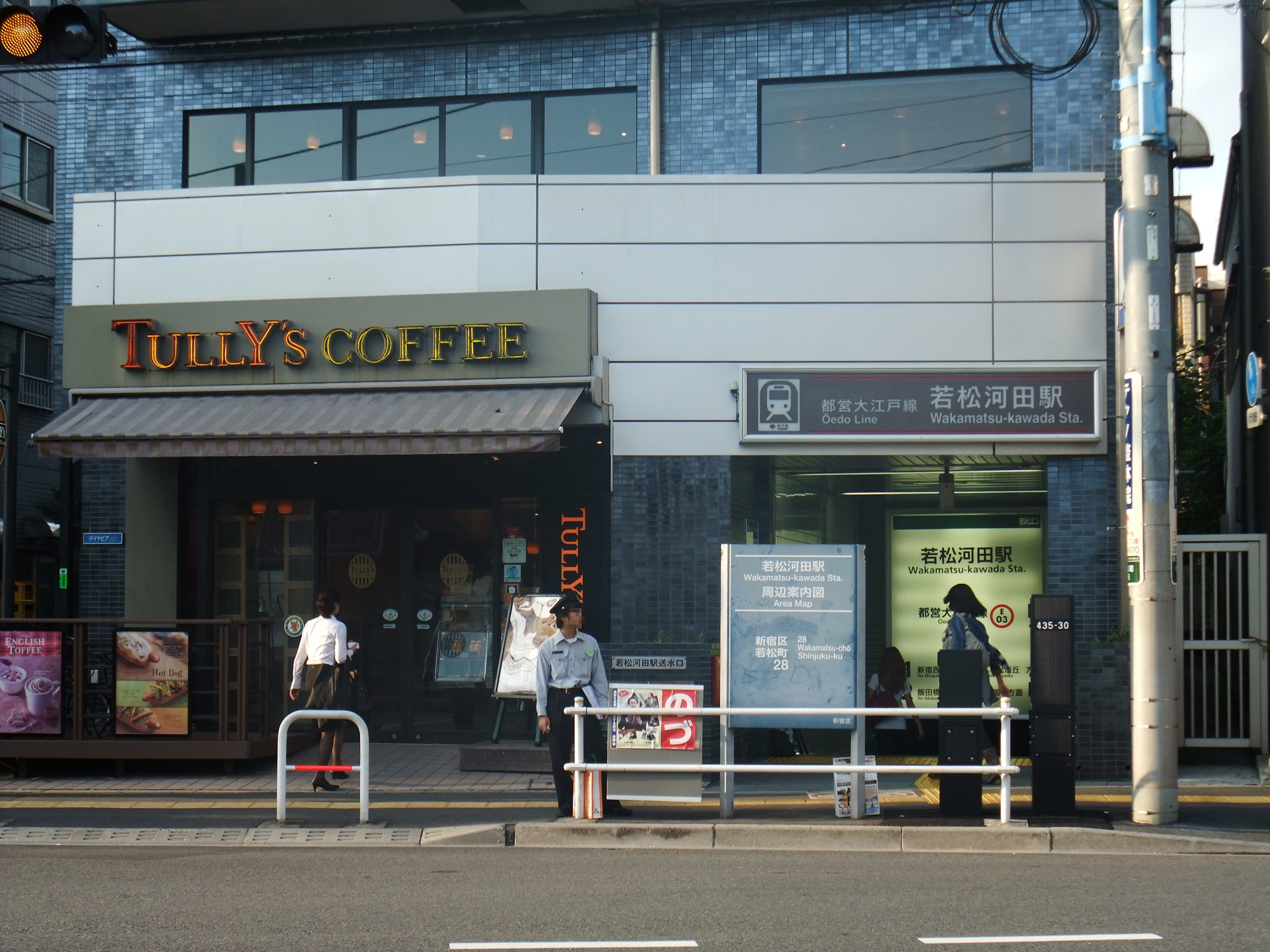 都営大江戸線若松河田駅若松口